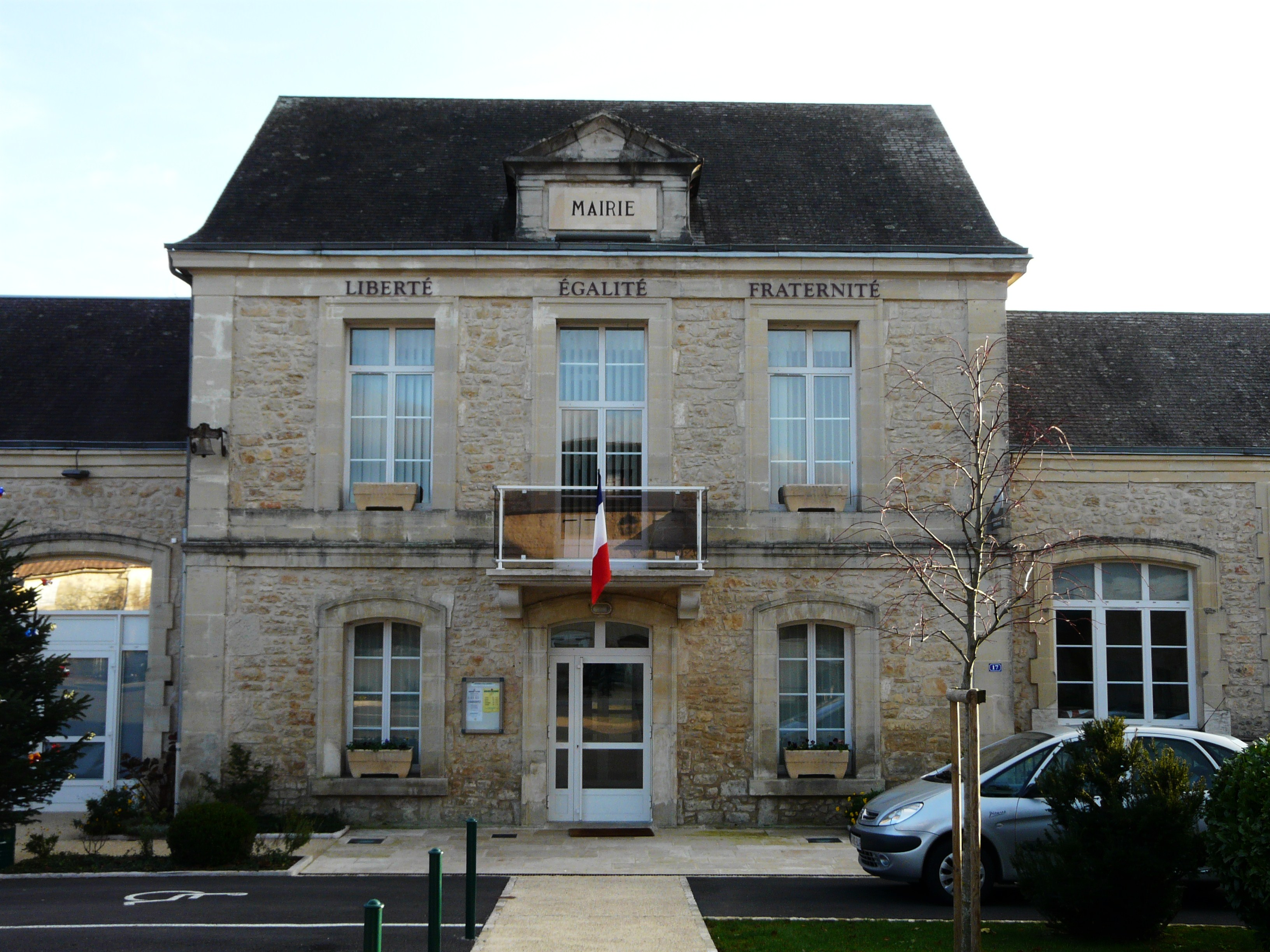 La mairie de Beauregard-de-Terrasson, Dordogne, France.